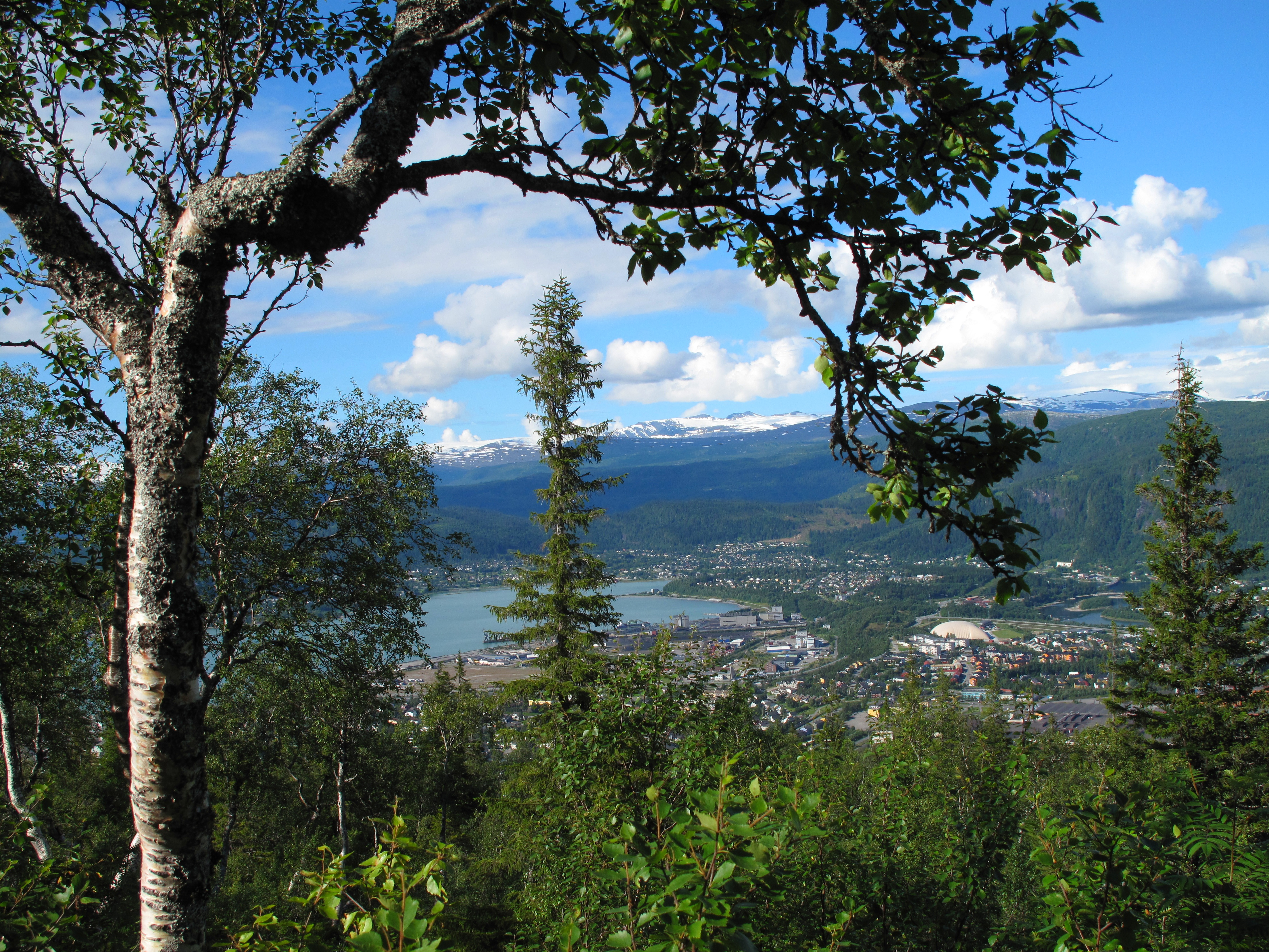 Furuhagen